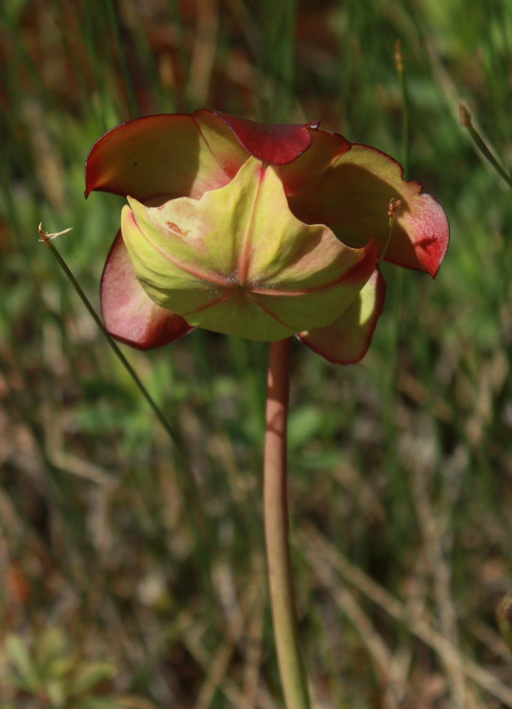 Fleur de sarracénie pourpre (Sarracenia purpurea) photographiée dans un fen de bassin situé entre Saint-Fabien et Le Bic, au Bas-Saint-Laurent, au Bas-Saint-Laurent (Québec).